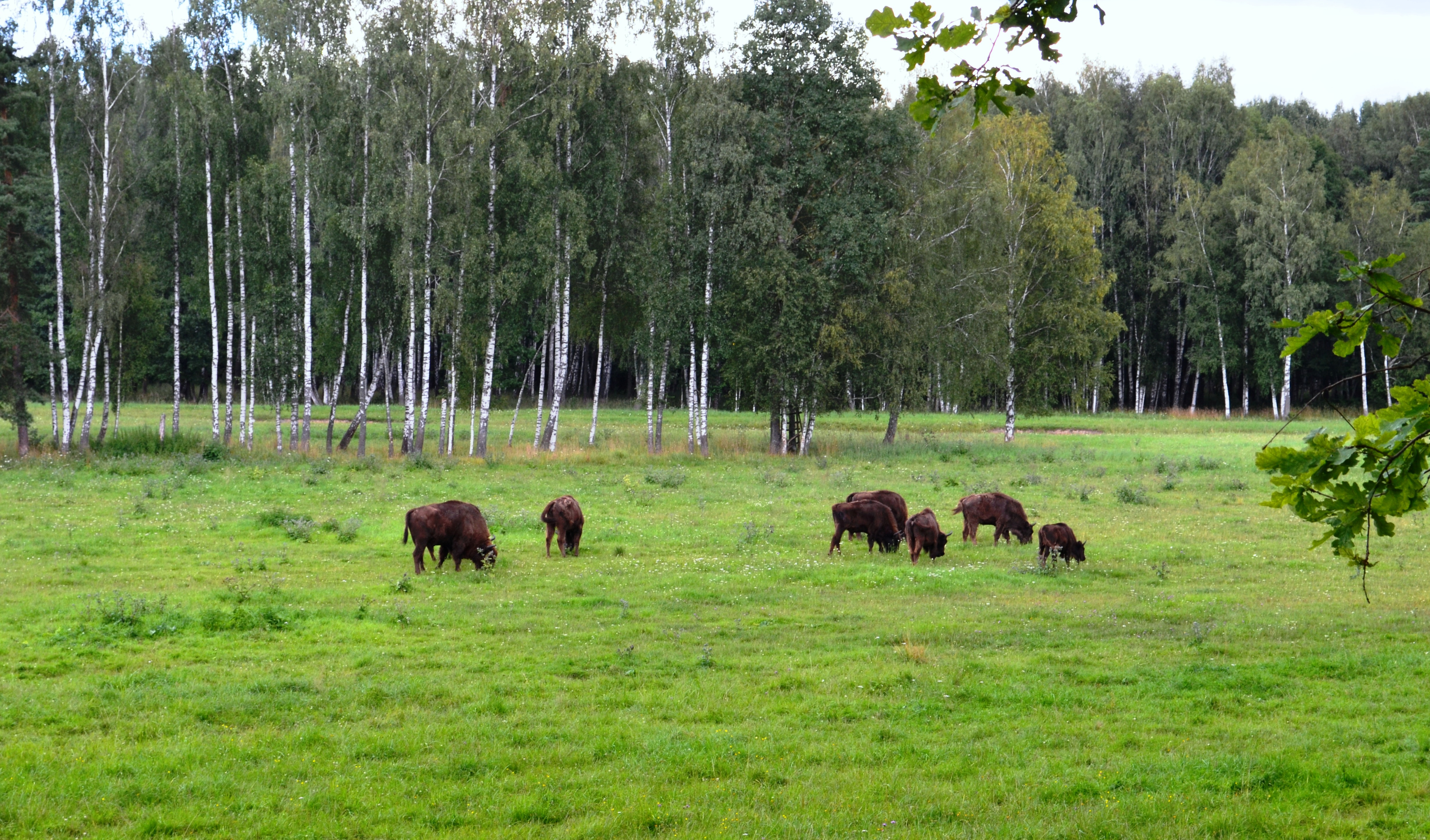 Pašilių stumbrynas, Panevėžio raj.